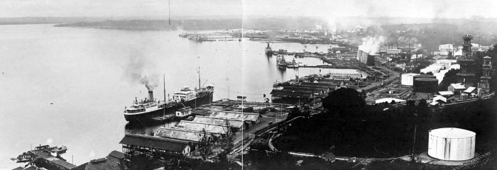 Repronegatief. B.P.M. emplacement, Balikpapan